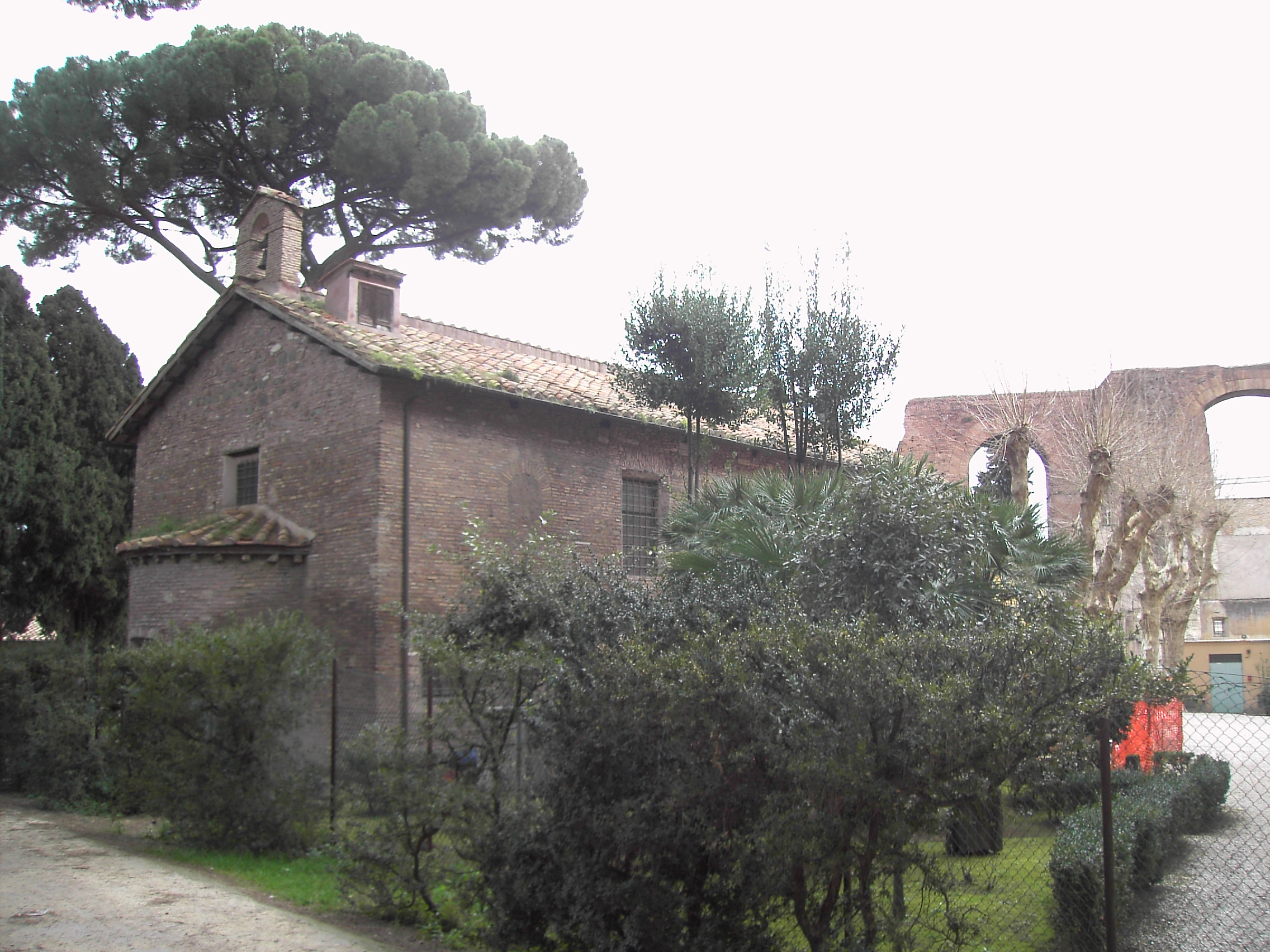 Roma, Villa Celimontana: absidiola di San Tommaso in Formis